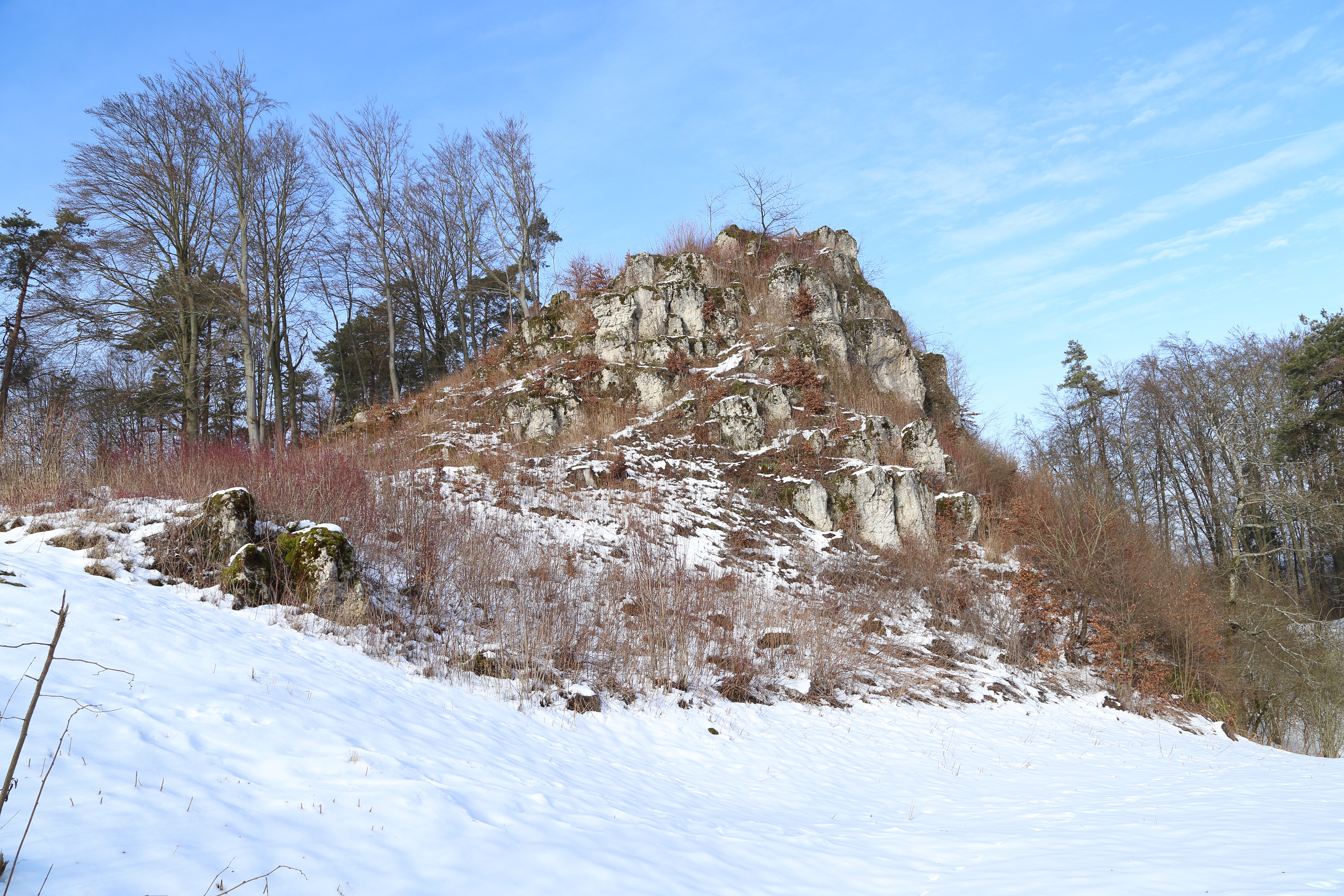 Spieser Felsen N von Spies 472R097 Betzenstein Bayreuth 6334 Betzenstein R: 4456815 H: 5500428 570 m ü.NN L: 150 m, B: 40 m, H: 30 m, F: 6000 qm Nördliche Frankenalb